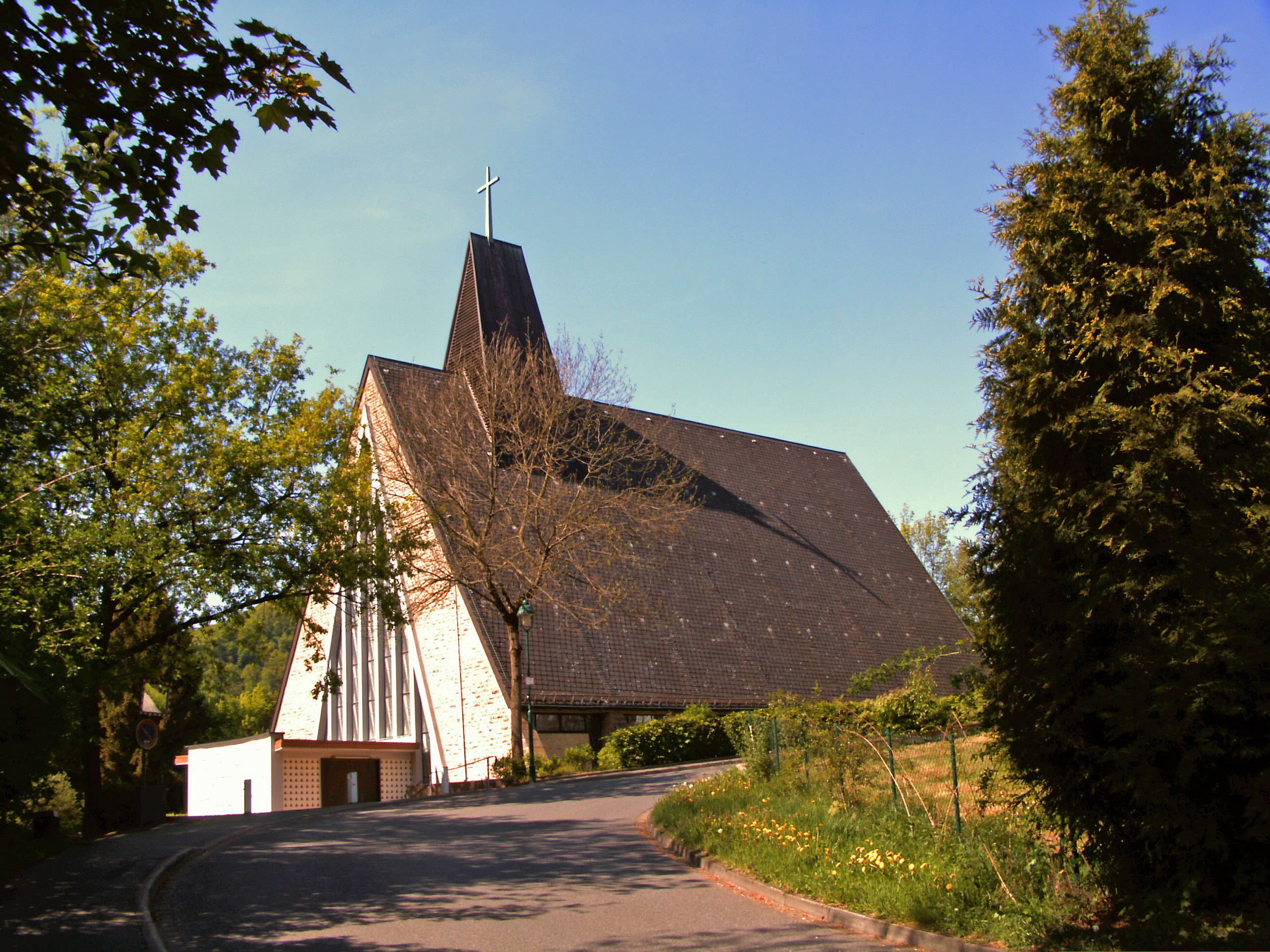 Katholische Kirche St. Benno in Bad Lauterberg im Harz, Landkreis Osterode